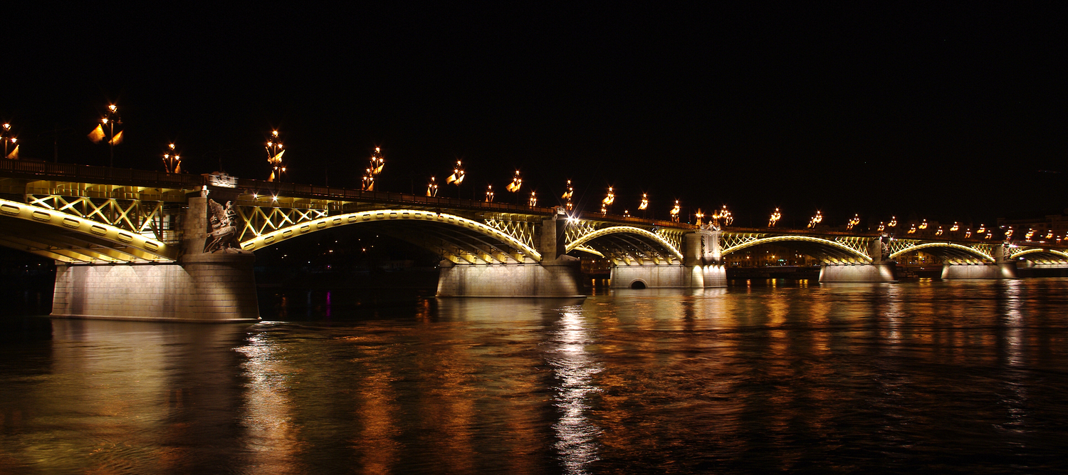 Margit híd This is a photo of a monument in Hungary. Identifier: 524